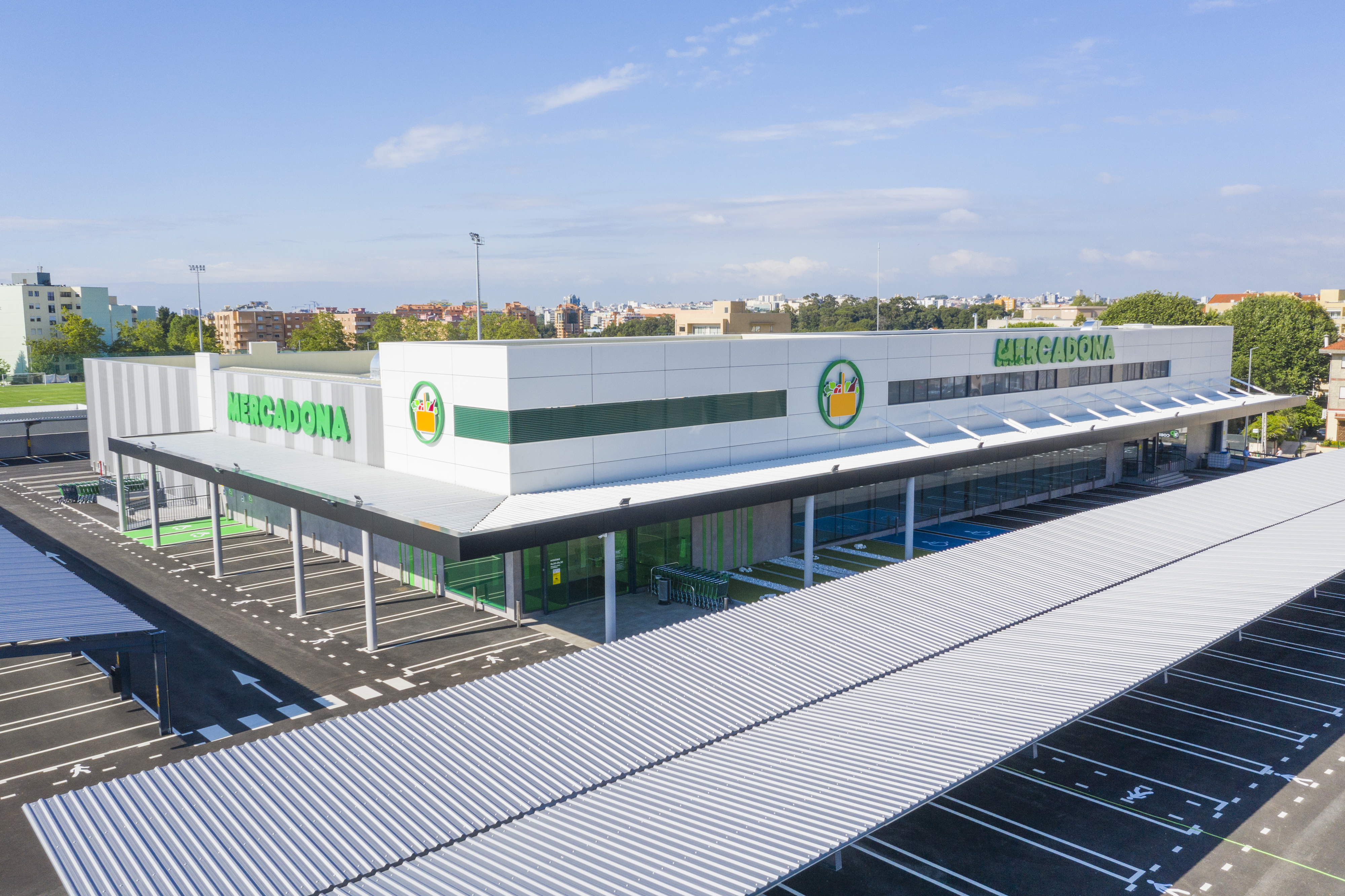 A Mercadona, empresa de supermercados, abre em Canidelo, Vila Nova de Gaia (distrito do Porto), o primeiro supermercado em Portugal.